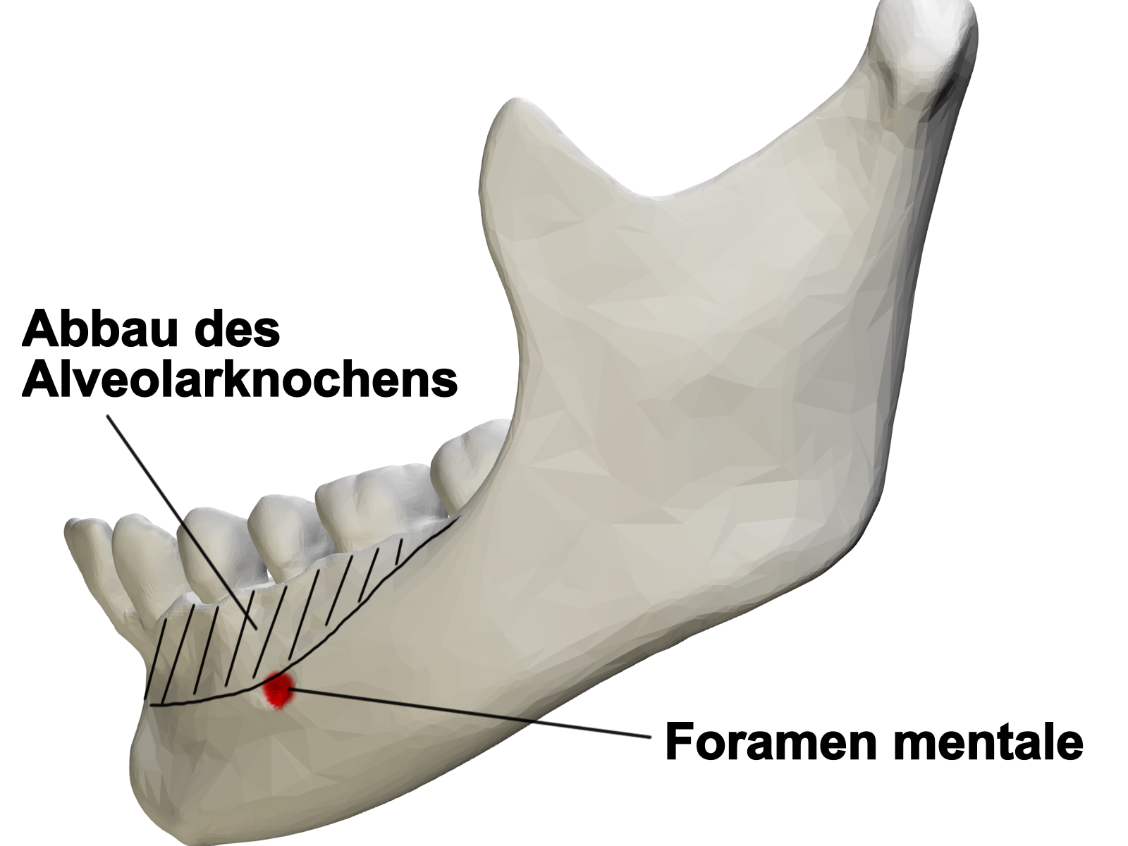 Foramen mentale und Abbau des Alveolarknochens